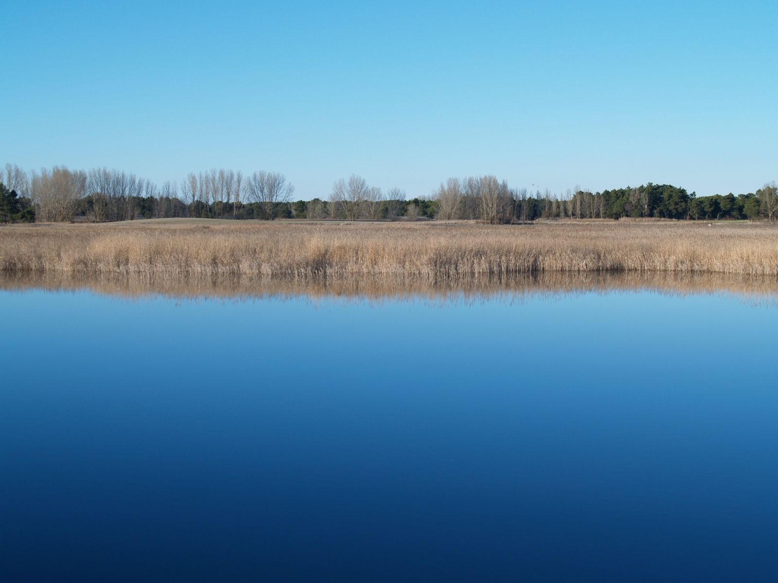 Laguna del Carrizal (Lastras de Cuéllar, Segovia)